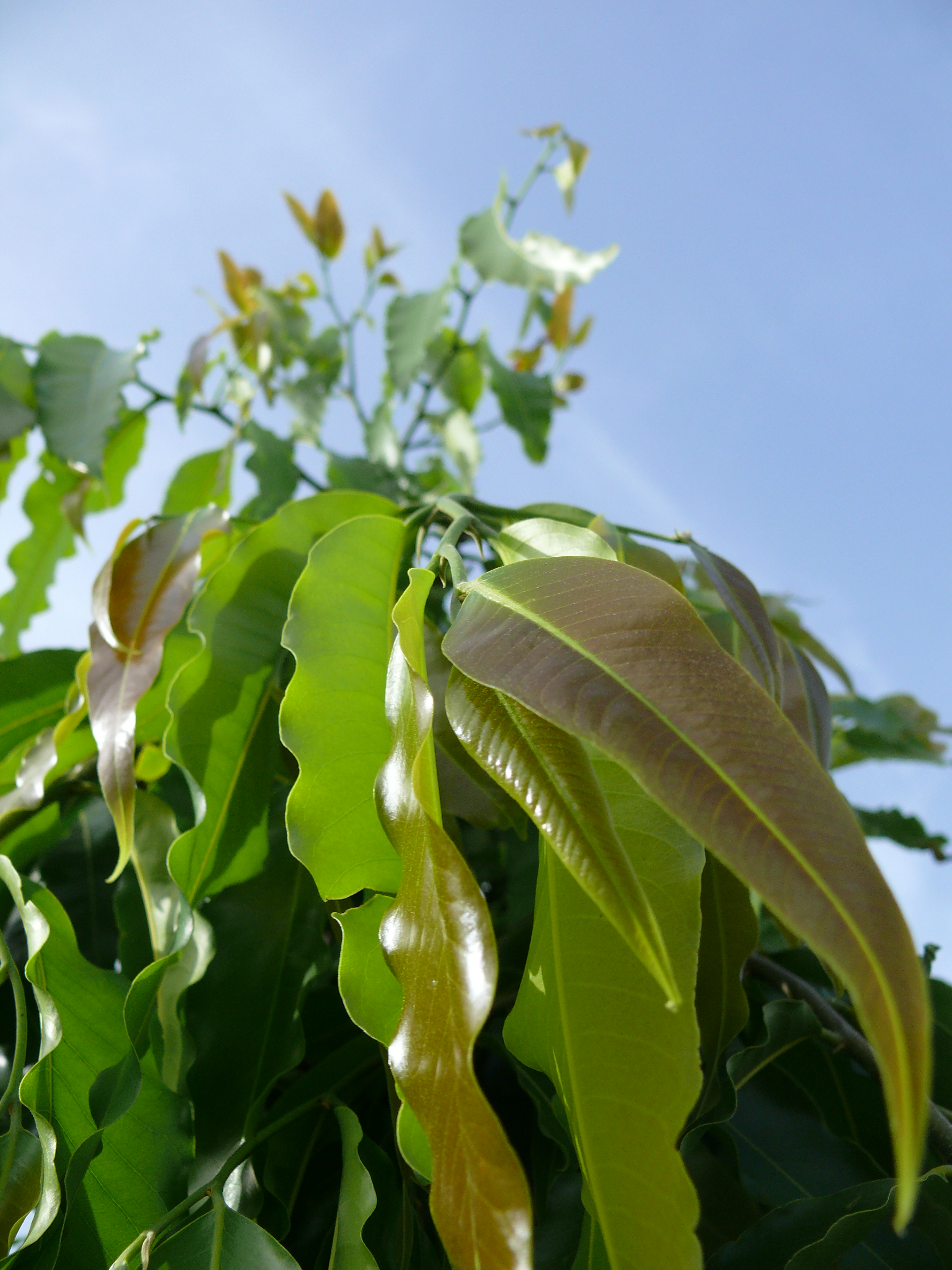 Polyalthia longifolia var. pendula - leaves